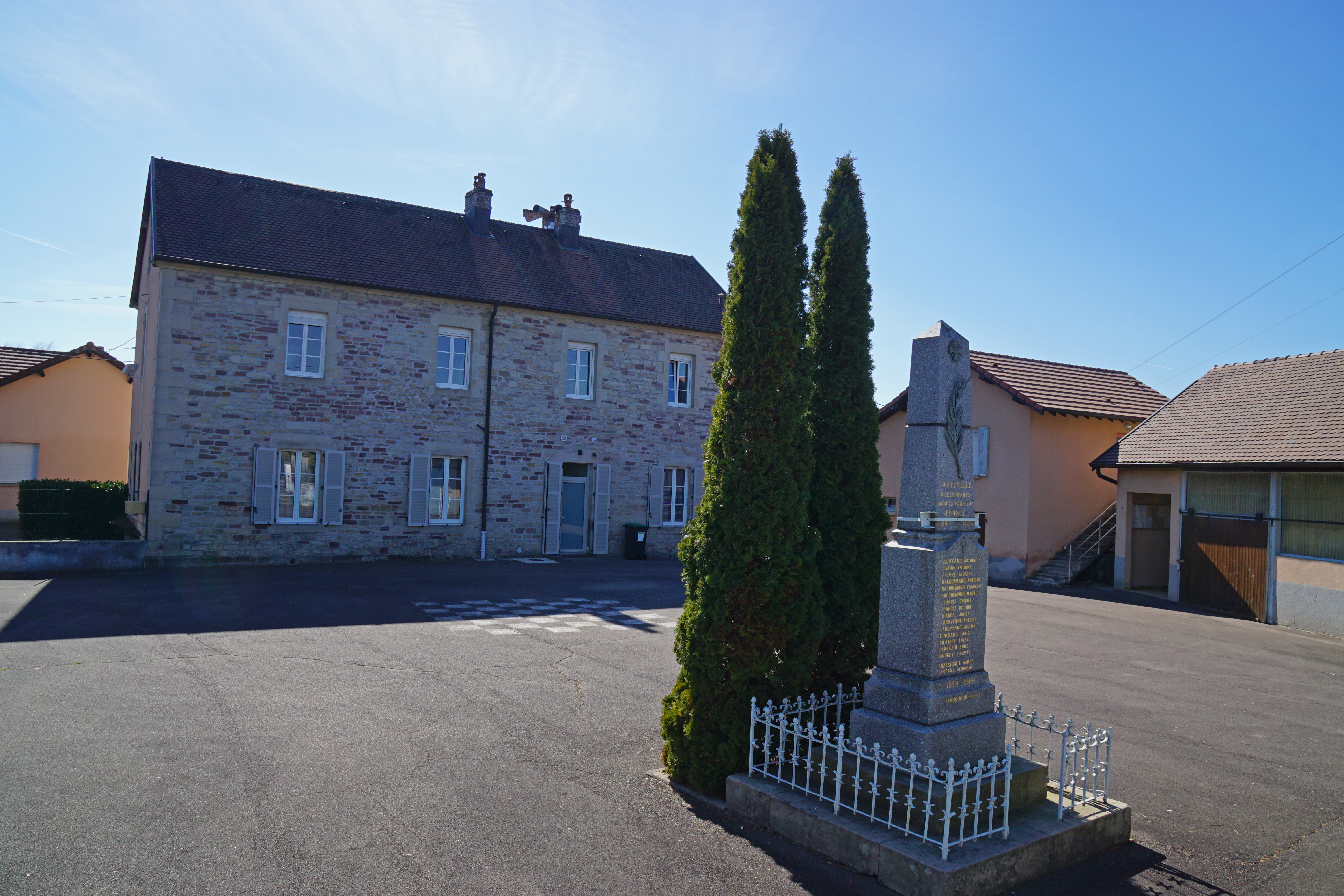 L'école de La Neuvelle-lès-Lure.